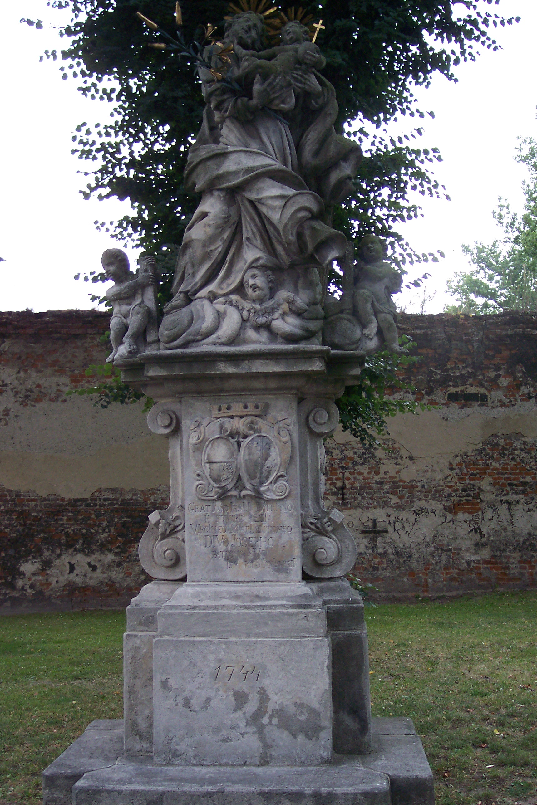 Figurka św. Józefa z Dzieciątkiem z 1749 r. obok kościoła p.w. św. Andrzeja Apostoła w Ujeździe